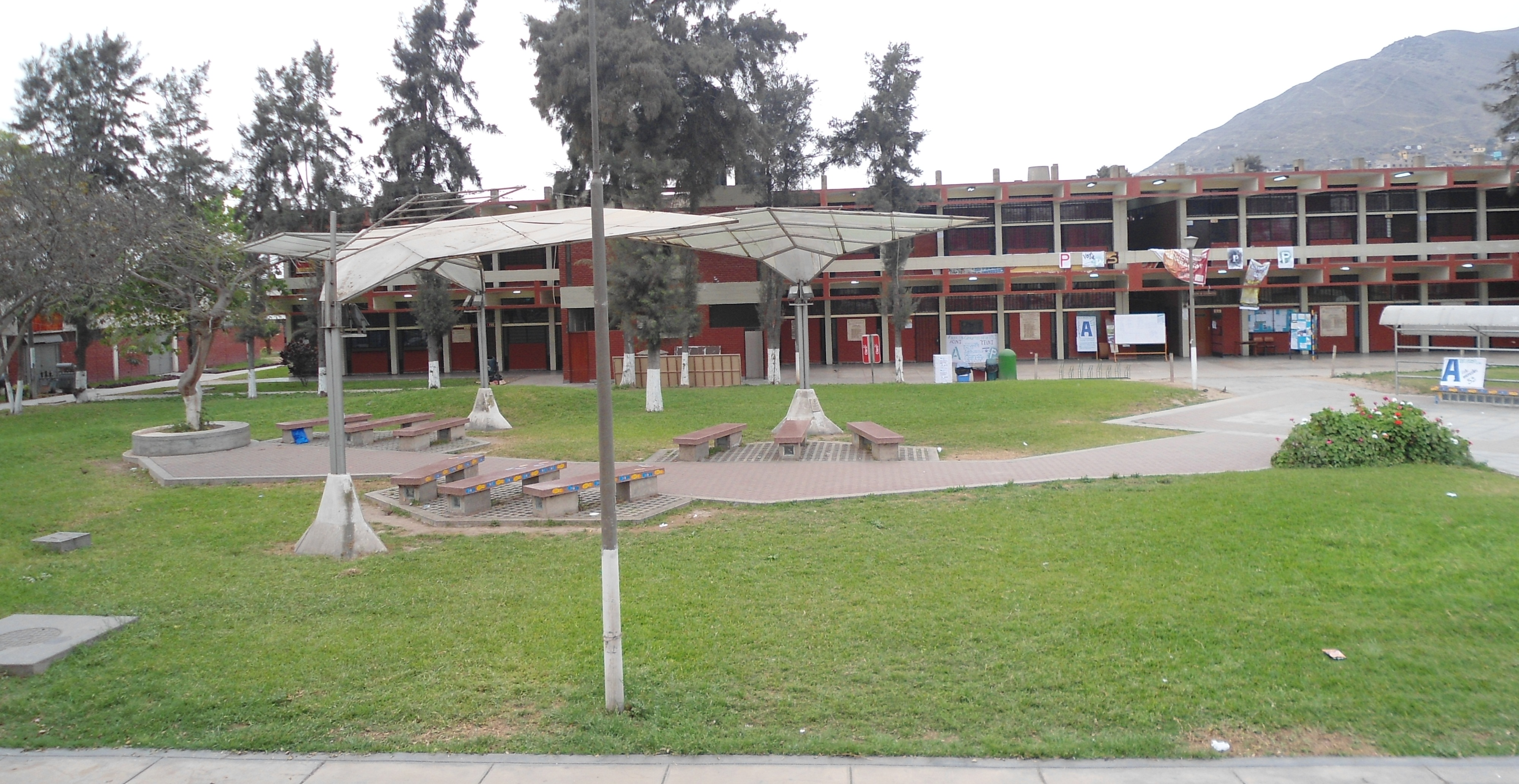 Vista de la Alameda de la FIIS UNI.